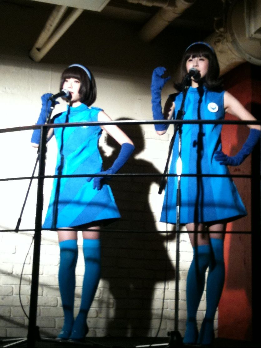 cerevoイメキャラのバニラビーンズ、本業はシンガー